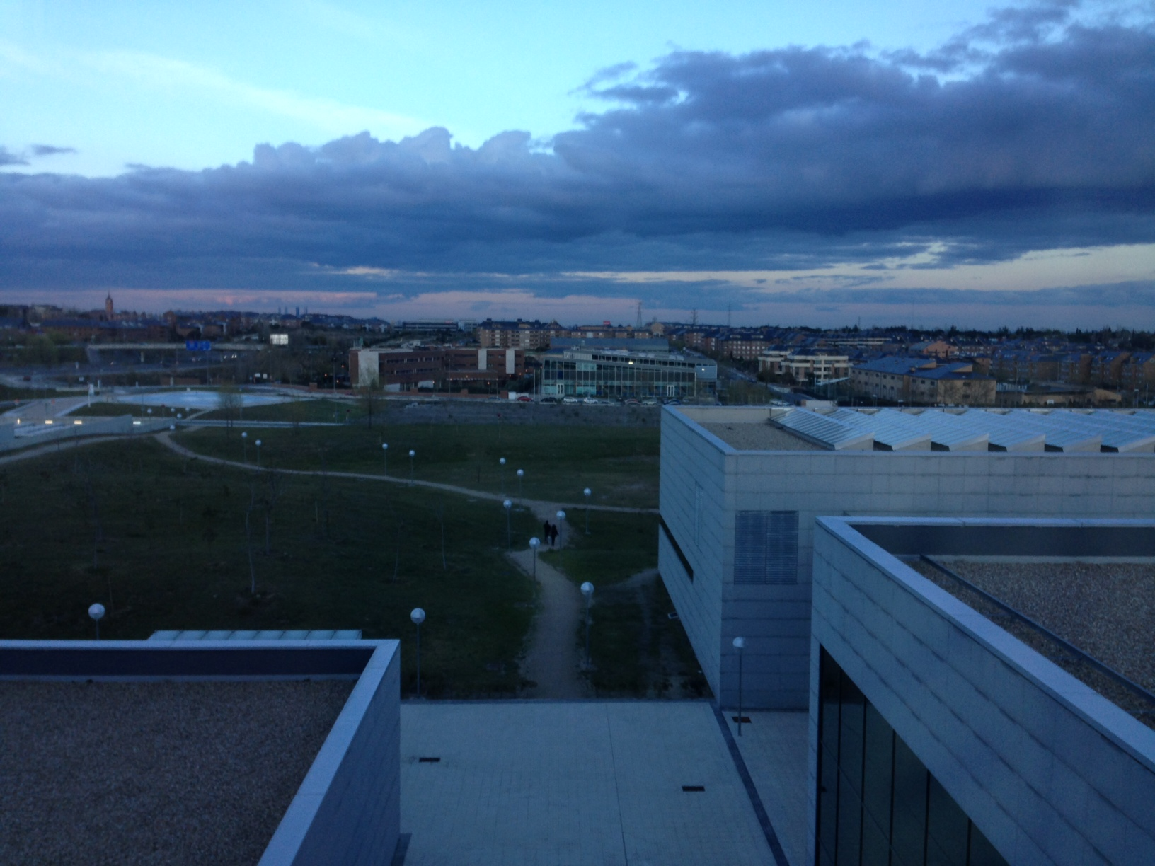 Antonio Trama